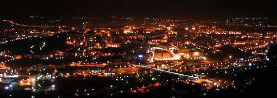 Panorama della città di Potenza